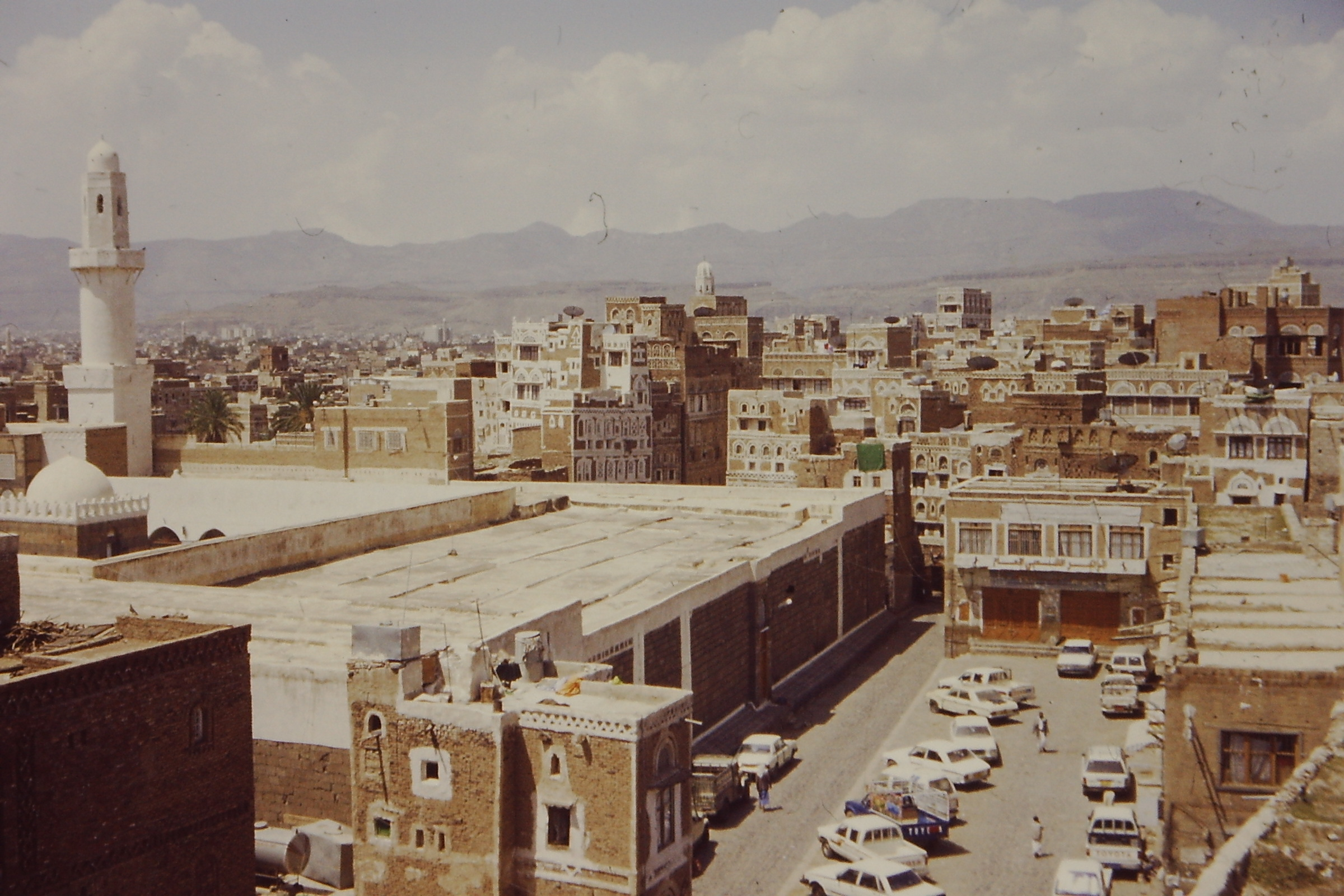 Antonia Yemen 2001